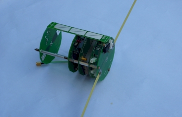 Maqueta de Ulises I